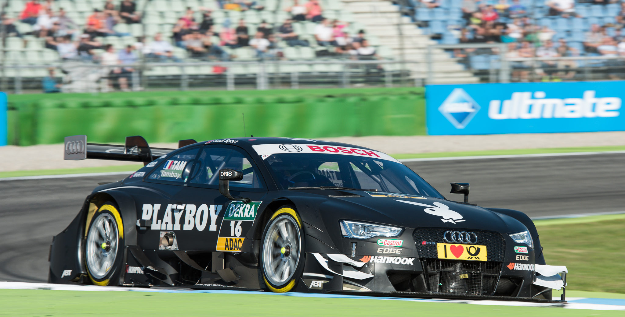 Abt Sportsline GmbH,Adrien Tambay,DTM,Deutsche Tourenwagen Masters,Hockenheimring,Motorsport,Playboy Audi RS 5 DTM